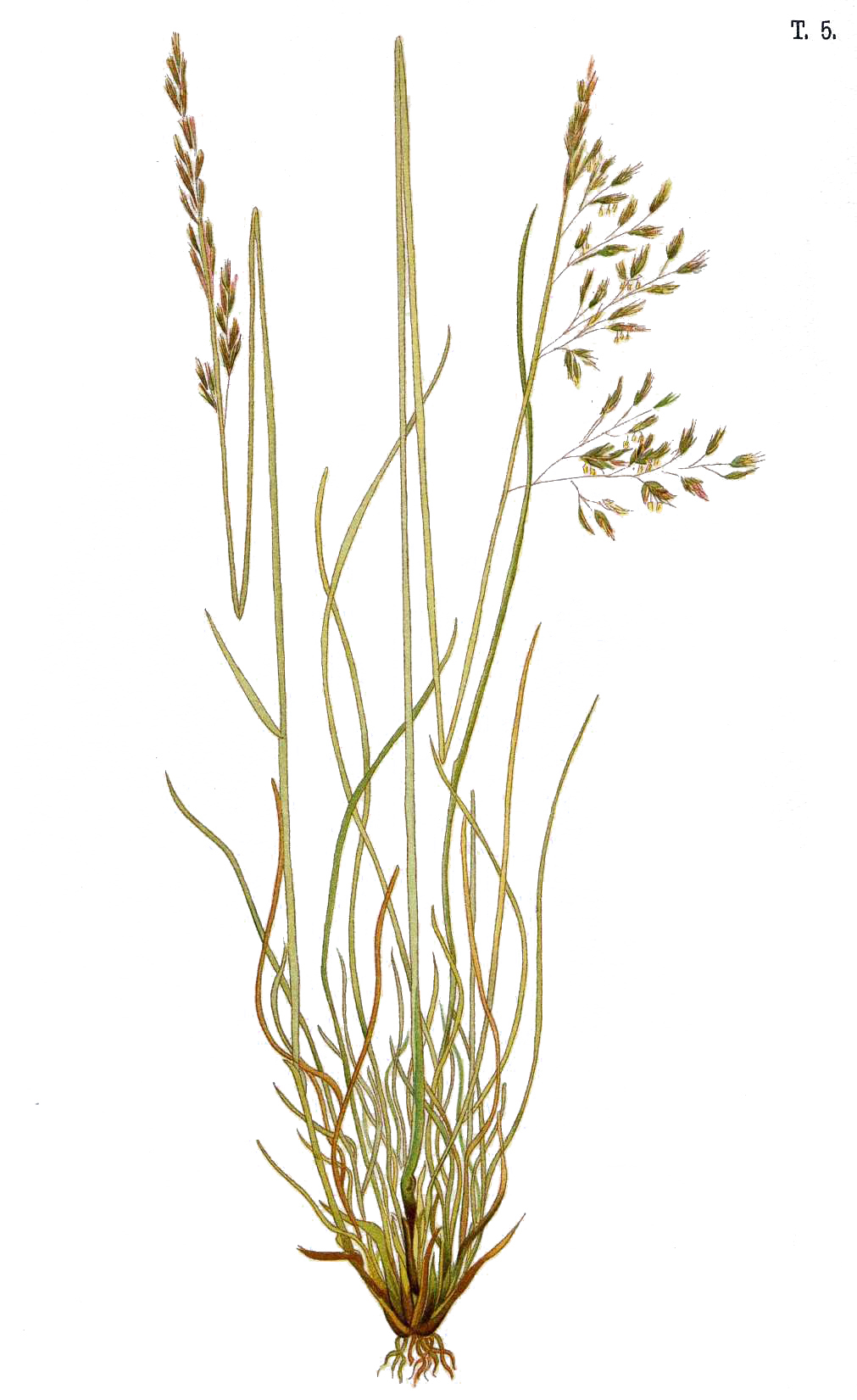 Овсяница овечьяLatina: Festuca ovina